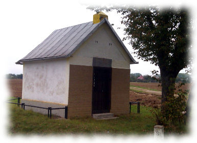 Kaplnka prícestná